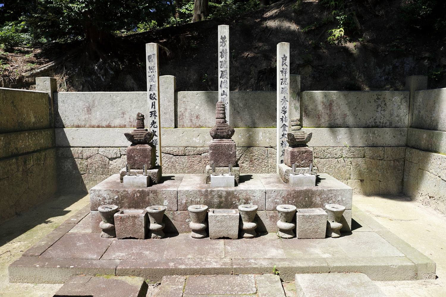 高月院の松平親氏墓（豊田市松平町、2019年（令和元年）8月）